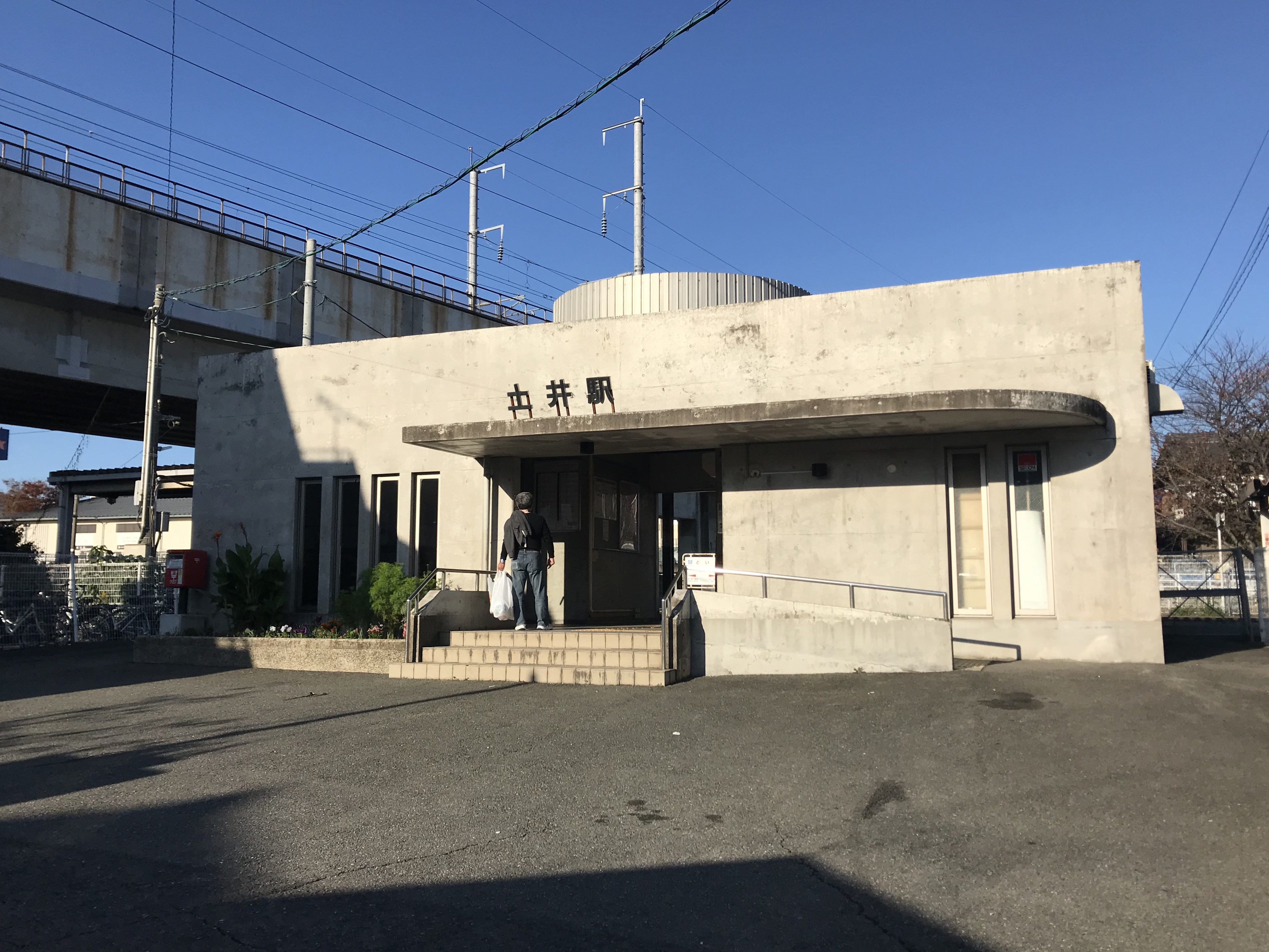 土井駅の駅舎と山陽新幹線